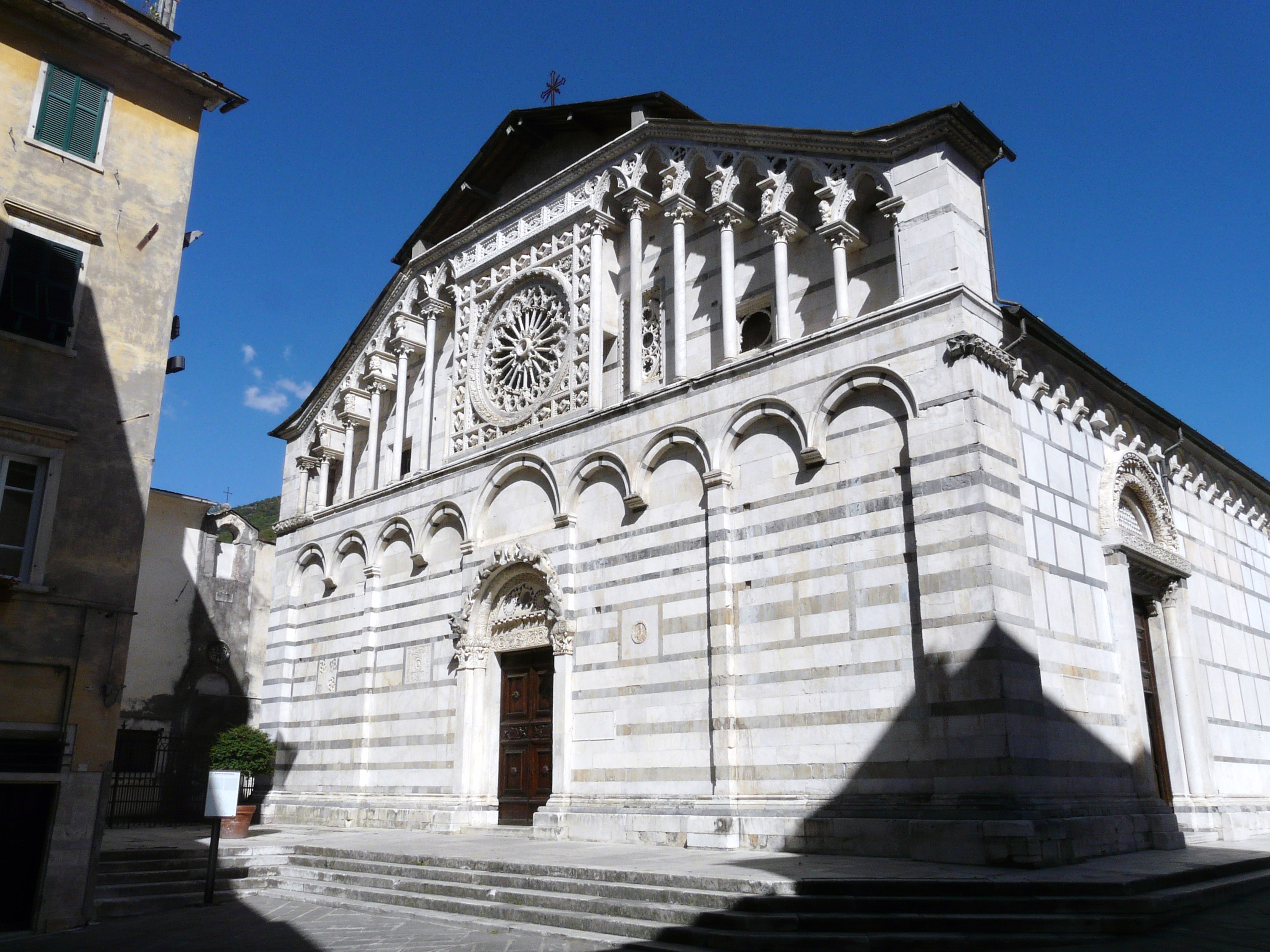 Facciata della cattedrale di Carrara, Toscana, Italia